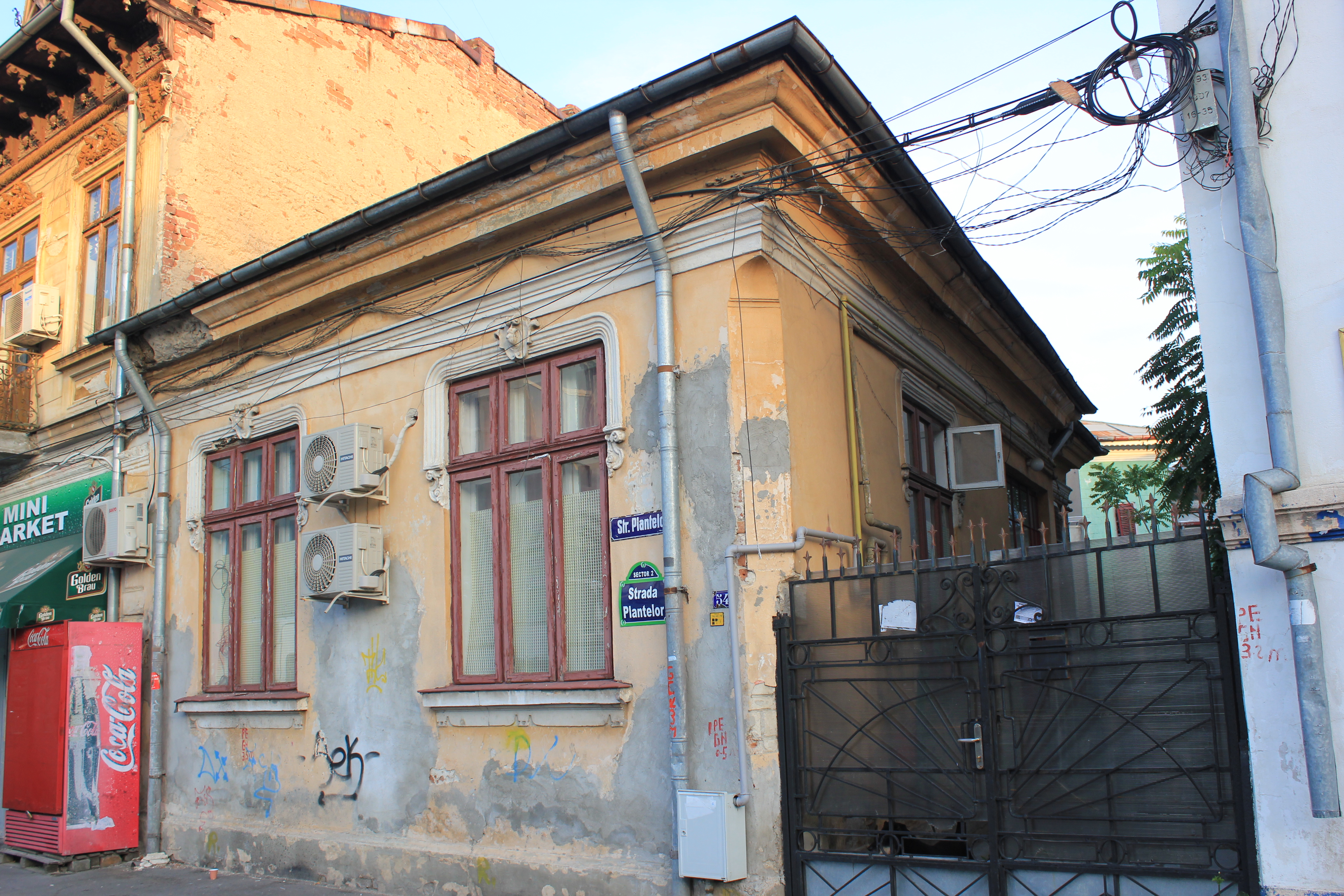 Casă Plantelor 54